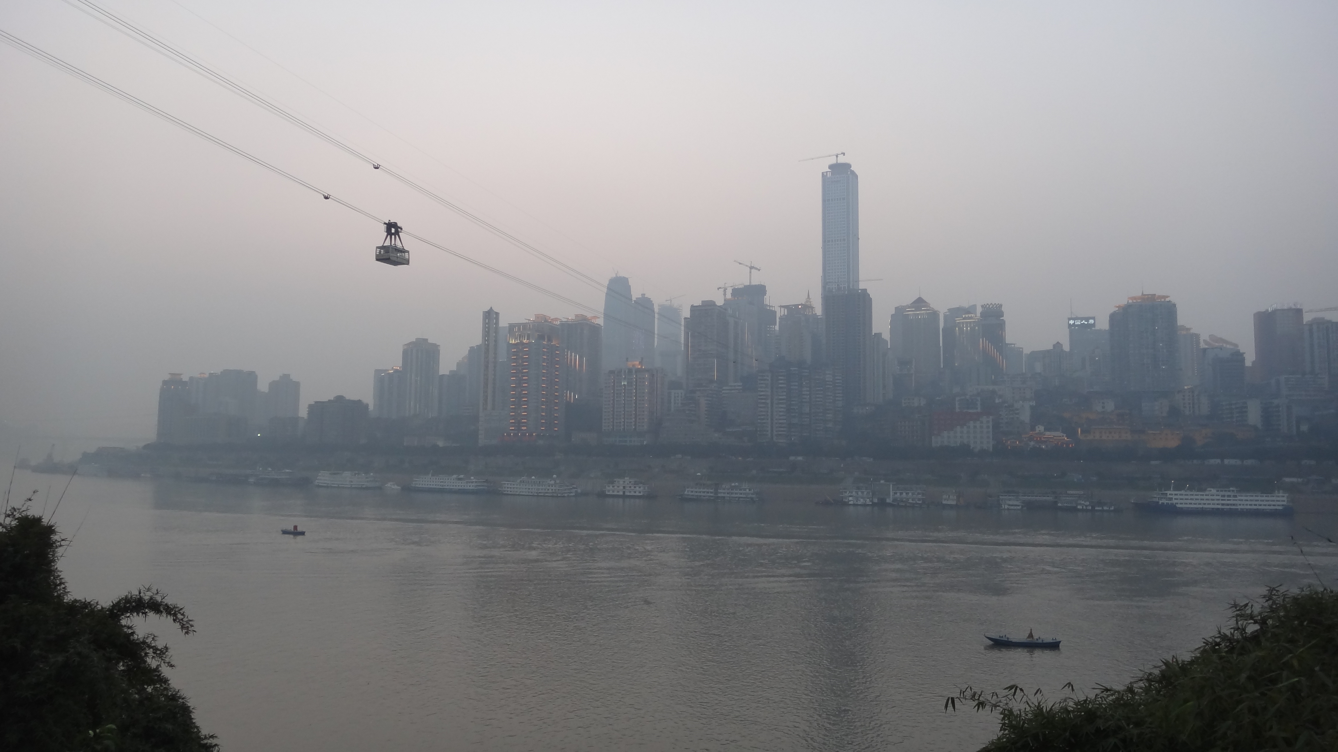 重庆市渝中区高楼林立，城市过江索道跨越长江，连通城区两岸